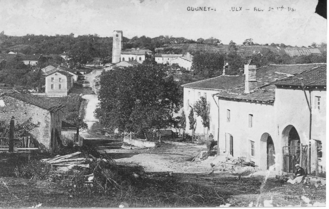 Gugney-aux-Aulx - Carte postale ancienne - Rue de l'église vue du haut de la rue Berthon. Derrière l'église, les vignes sont encore cultivées